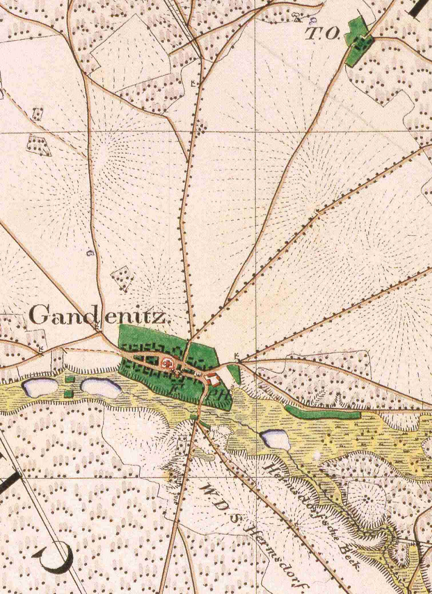 Gandenitz, Ortsteil der Stadt Templin, Landkreis Uckermark, Brandenburg, Ausschnitt aus dem Urmesstischblatt 2846 Gandenitz von 1825